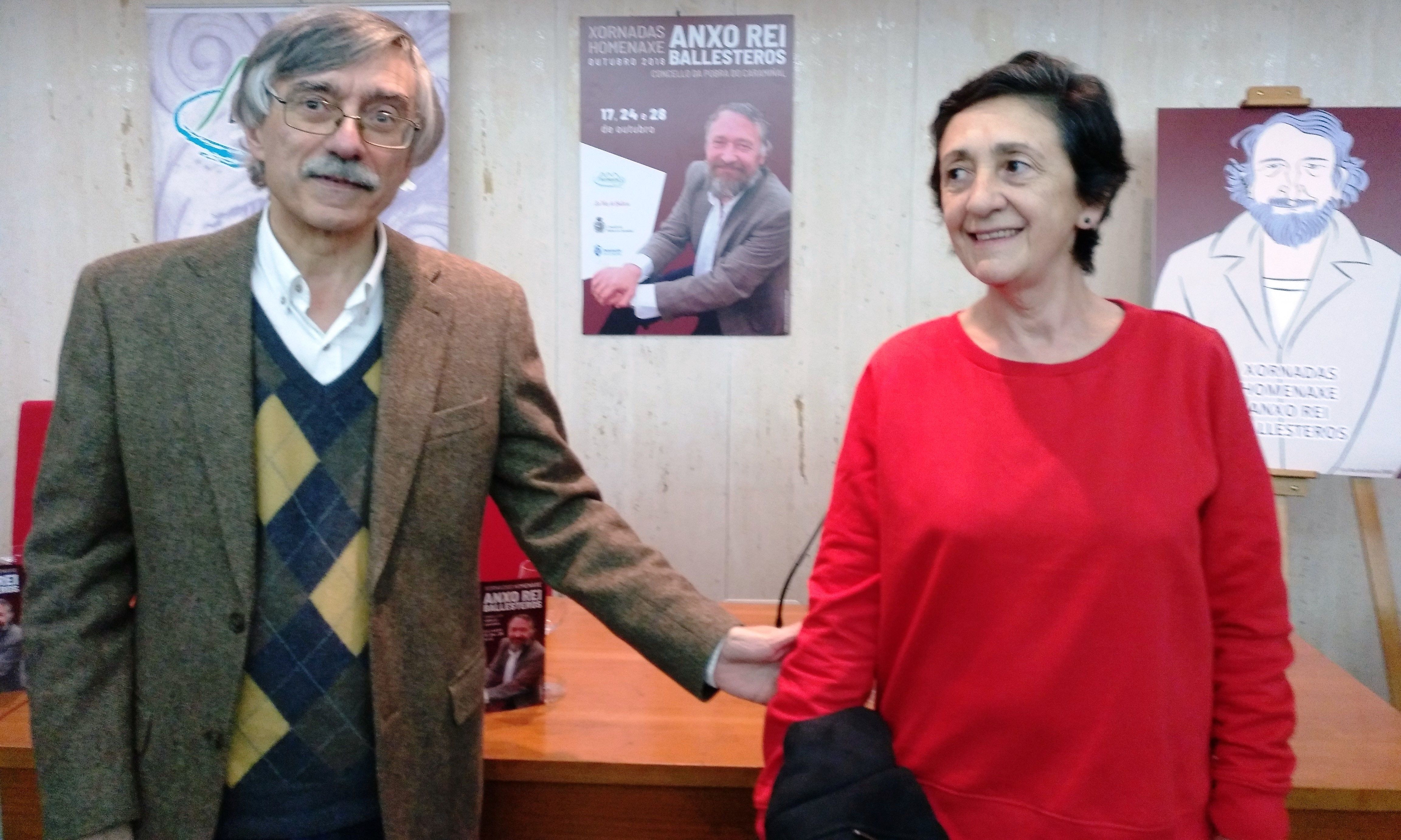 Manuel Castelao e María Jesús Armada (viúva do escritor) na Pobra do Caramiñal nas Xornadas de Homenaxe a Anxo Rei Ballesteros. 24/10/2018